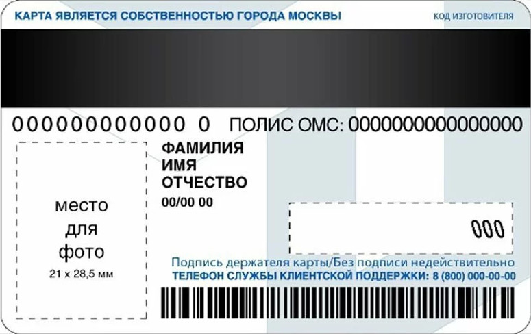 Карта москвича 2018 (реверс)